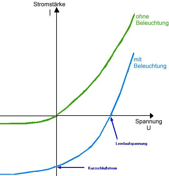 GNU-FDL selbst gezeichnet, Kennlinie (Strom/Spannung) einer Solarzelle, beleuchtet und unbeleuchtet